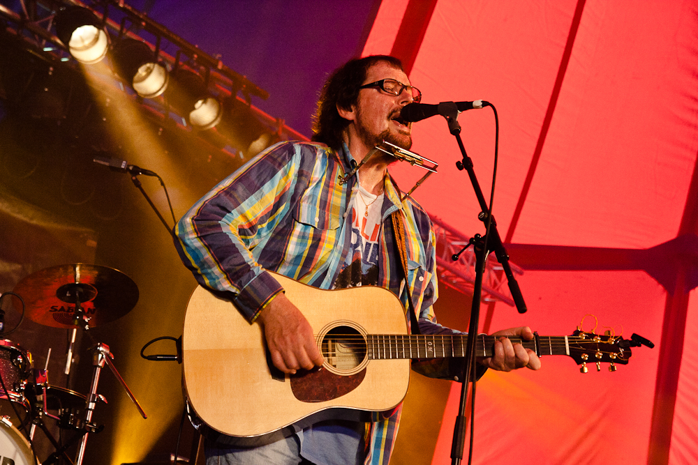 Ola Magnell vid Trästockfestivalen i Skellefteå, 2011.